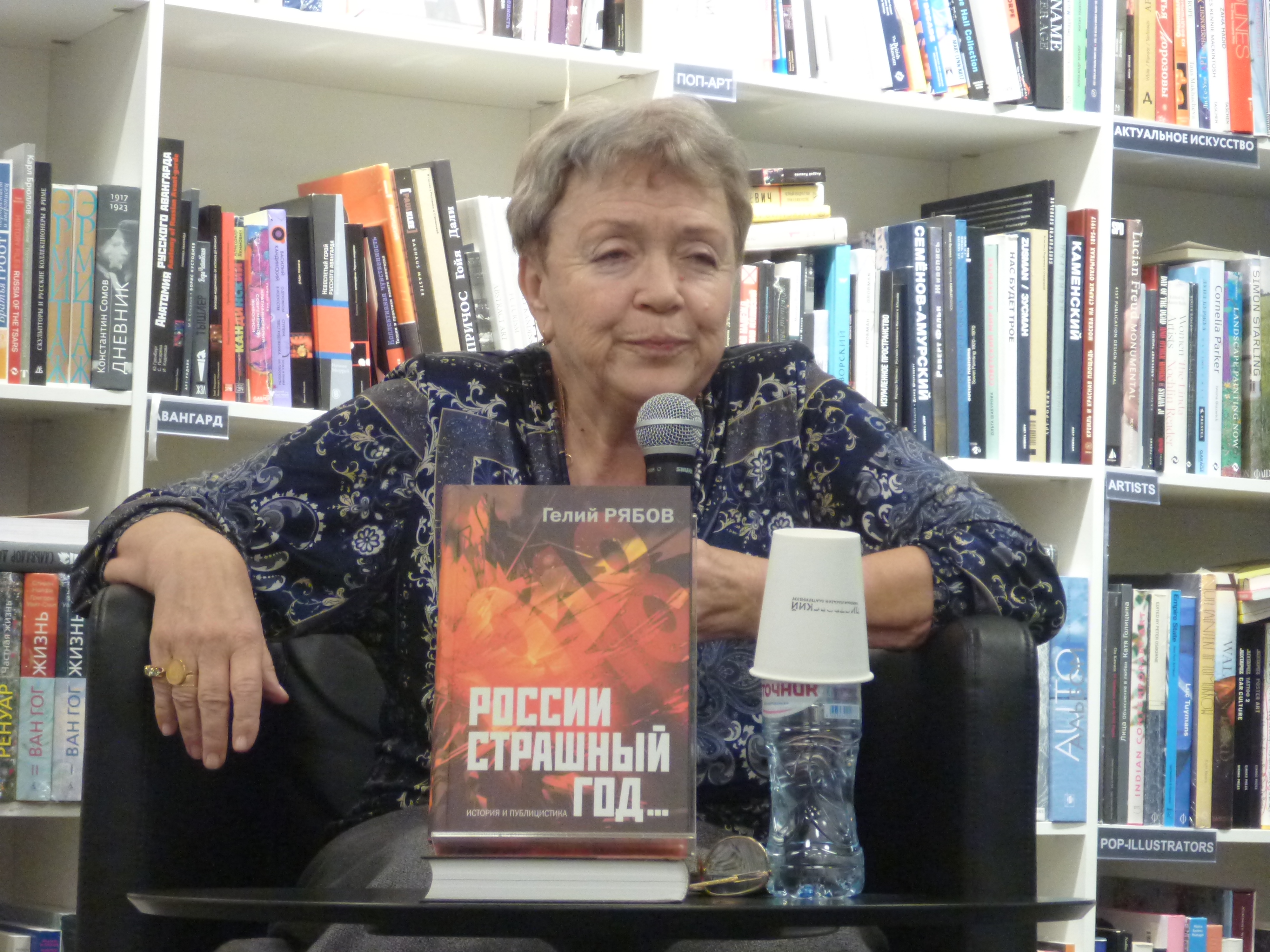 Ольга Рябова вдова Гелия Рябова в Ельцин-центре, 28 ноября 2019 года